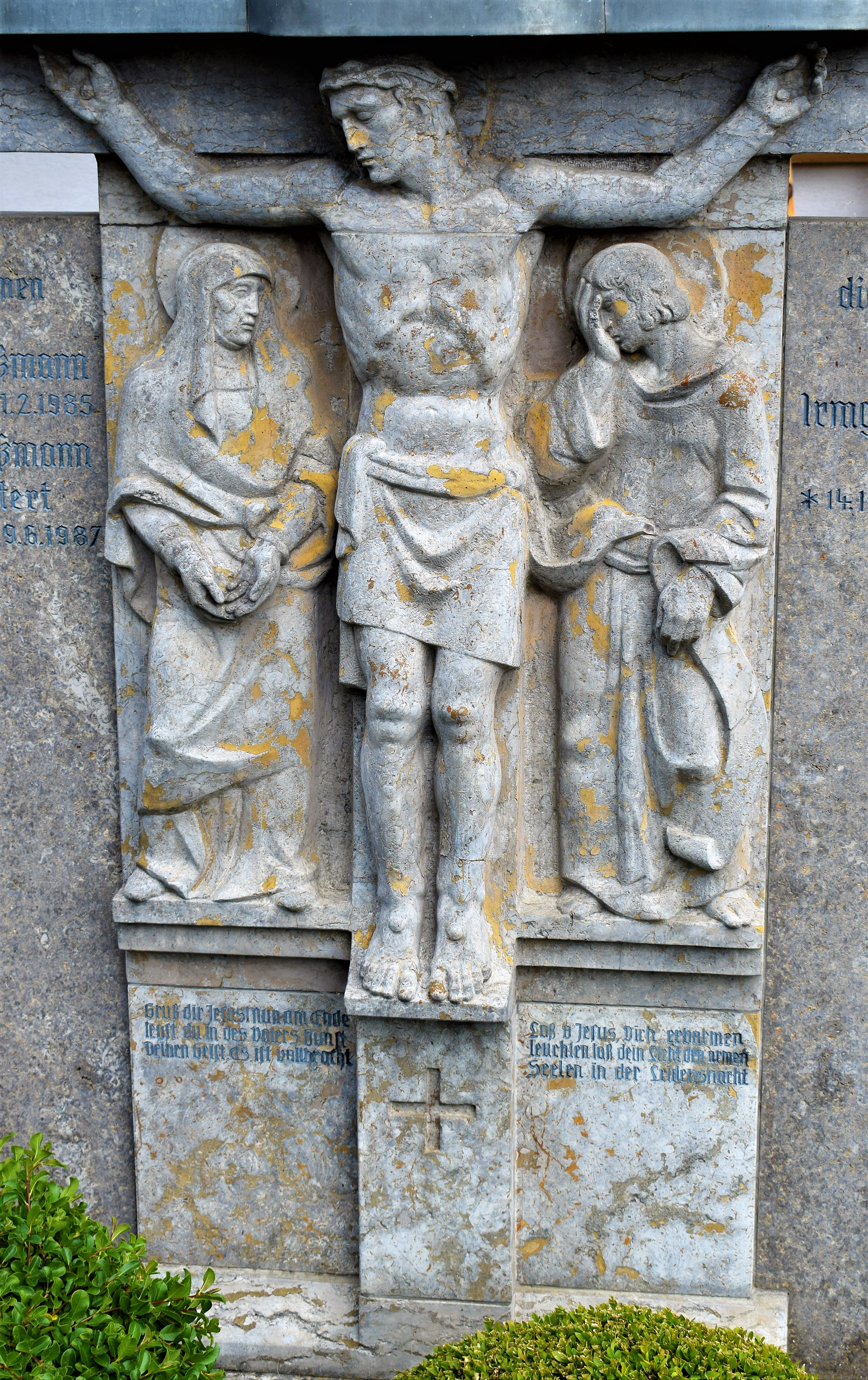 Kirchheim (Unterfranken), Ortsteil Gaubüttelbrunn, Friedhof – Kreuzwegstationen von Ludwig Sonnleitner (1940) – 12. Station: Jesus stirbt am Kreuz